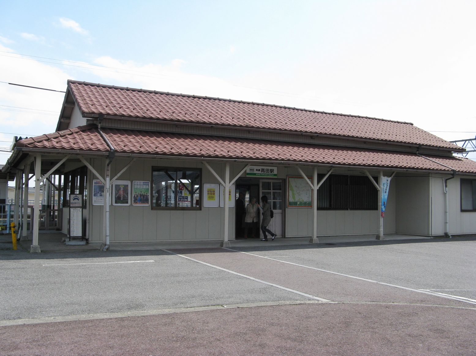 美濃高田駅